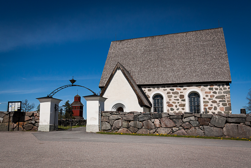 Skäfthammars kyrka i Gimo med klockstapeln i bakgrunden.